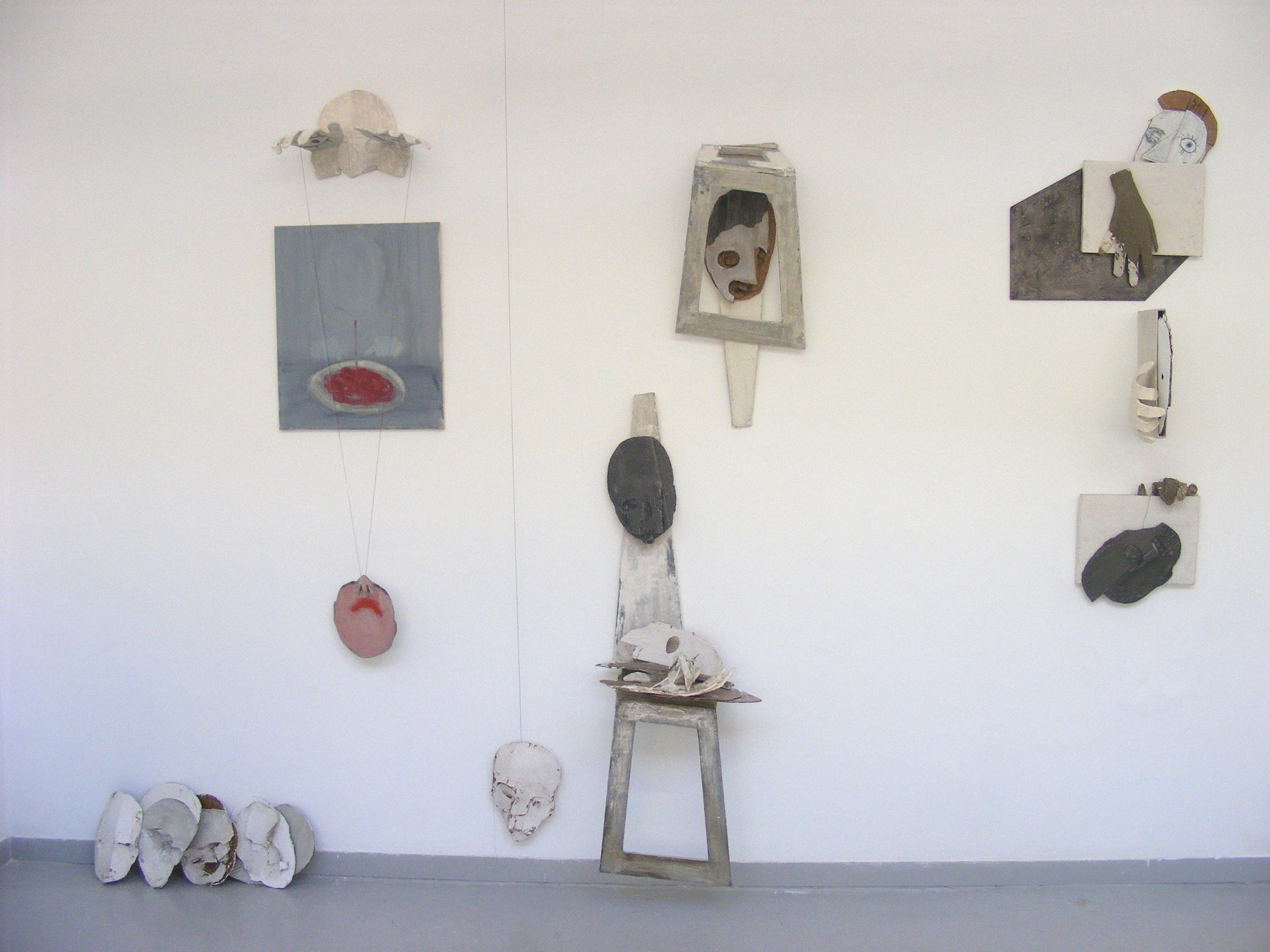 מראה הצבה , קיר אמן במקום לאמנות, 2015